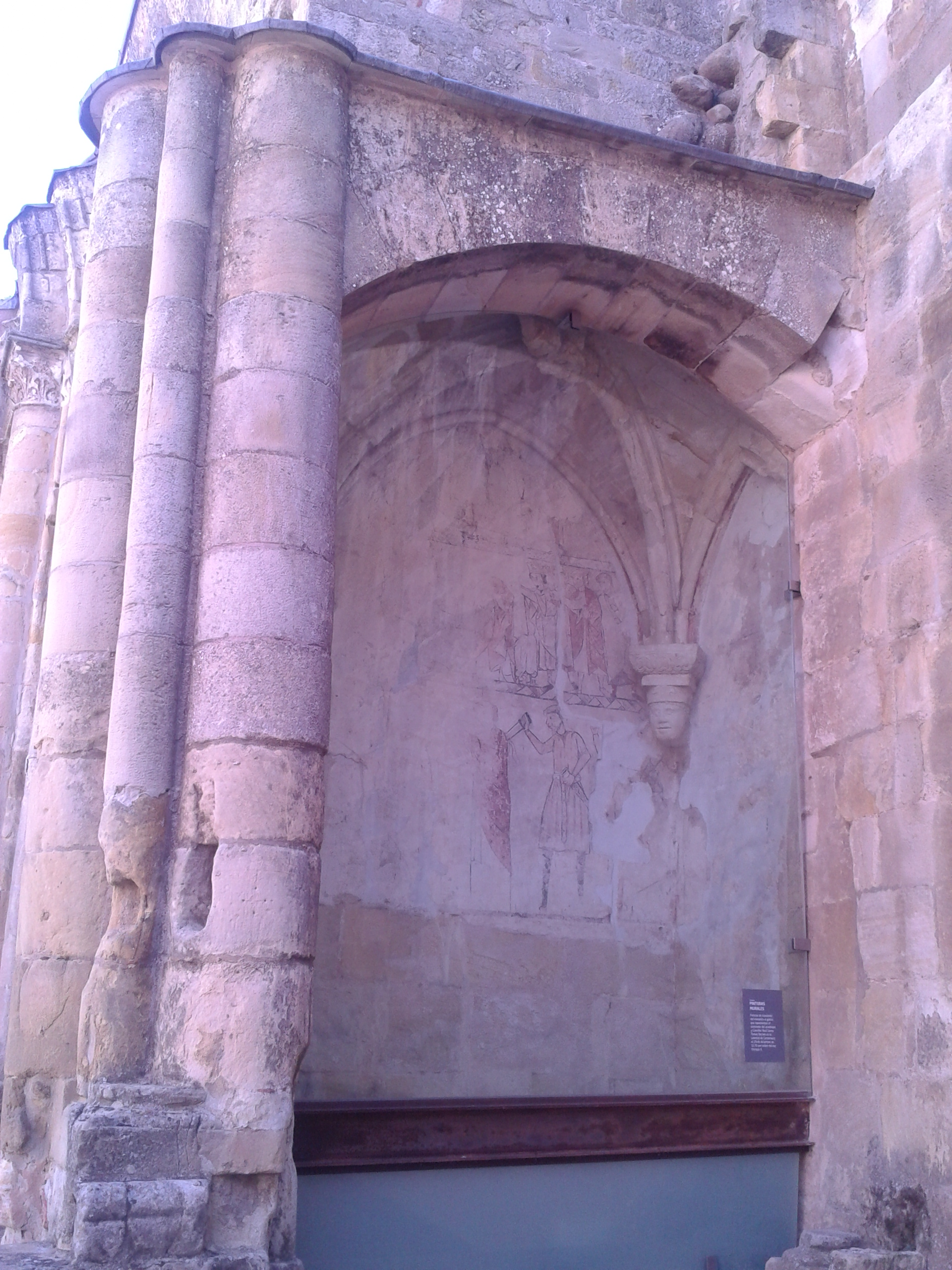 Foto de la Iglesia de San Nicolás (Soria)